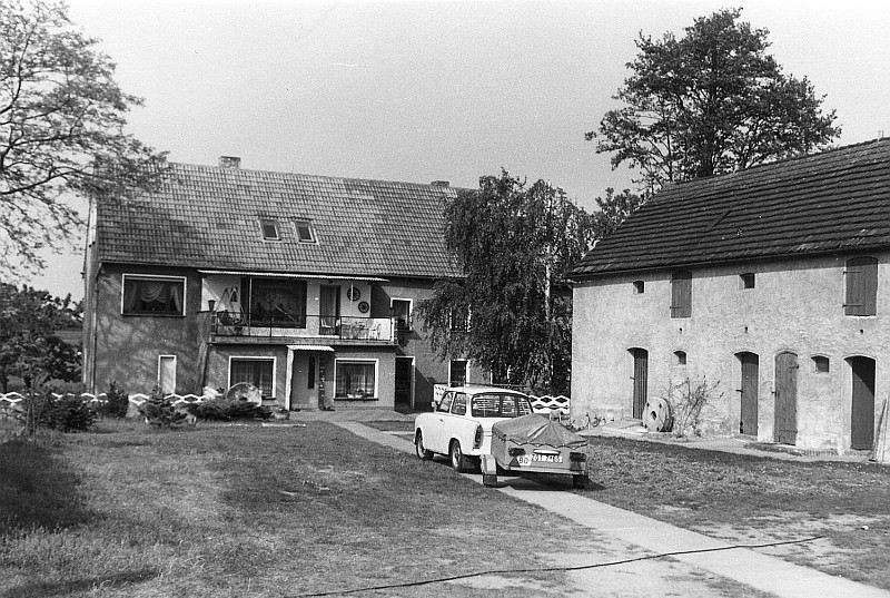 Original image description from the Deutsche Fotothek Großkmehlen-Kleinkmehlen. Ehem. Mühle, Hofansicht